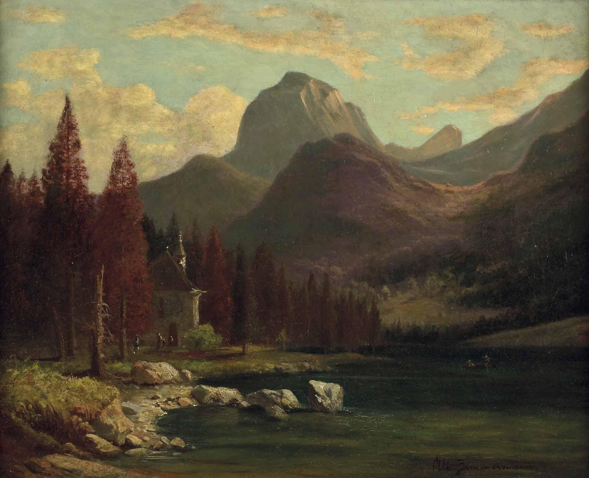 Antonikapelle am Hintersee bei Berchtesgaden. Signiert: Alb. Zimmermann, Öl auf Leinwand, ca. 56 x 68 cm